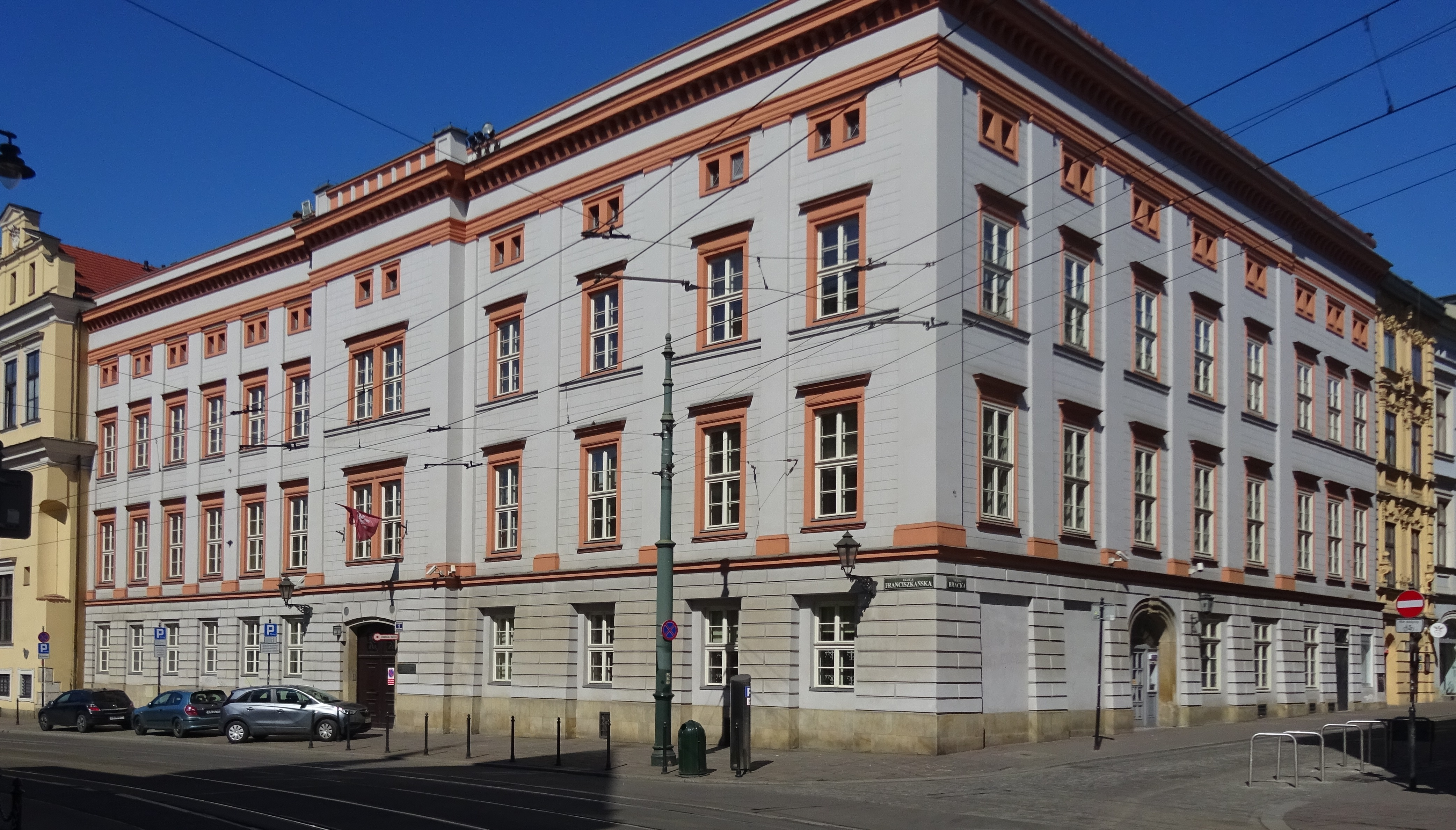 Pałac Sanguszków w Krakowie. Siedziba Uniwersytetu Papieskiego Jana Pawła II. Ulica Franciszkańska 1. 2020